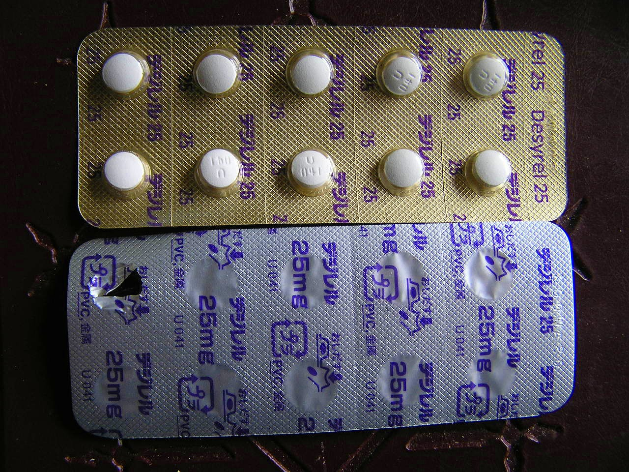 塩酸トラゾドン（えんさんトラゾドン、trazodone hydrochloride）は、抗うつ薬として用いられる有機化合物の一種。分子式は C20H23N・HCl 。水、エタノール、クロロホルムにやや溶けやすくジエチルエーテルに溶けにくい。 うつ病、うつ状態に適応があり、眠気の副作用と抗うつ作用から睡眠導入剤の代替品として用いられることもある。 日本国内ではファイザーからデジレル®、オルガノンからレスリン®などの商品名で発売されている。